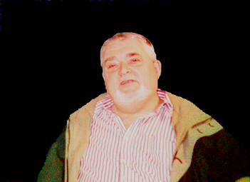 Portrait d'Gérard Deschamps.